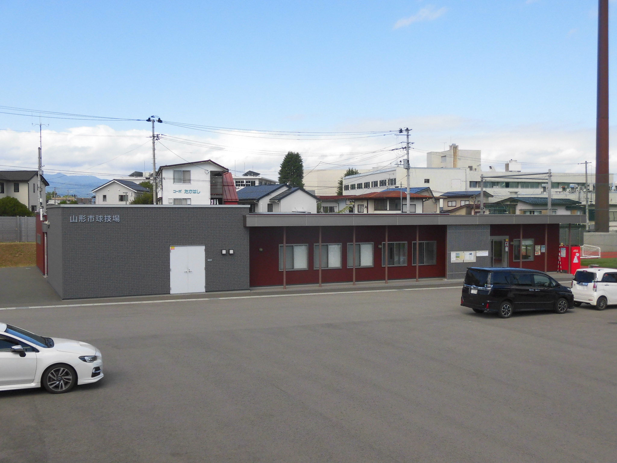 山形市球技場（クラブハウス）。山形県山形市薬師町に所在。